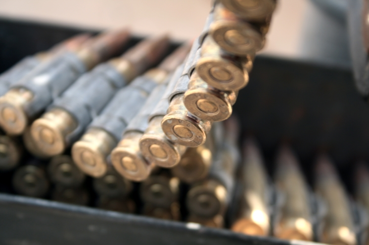 Belt of 7.62mm linked ammunition.